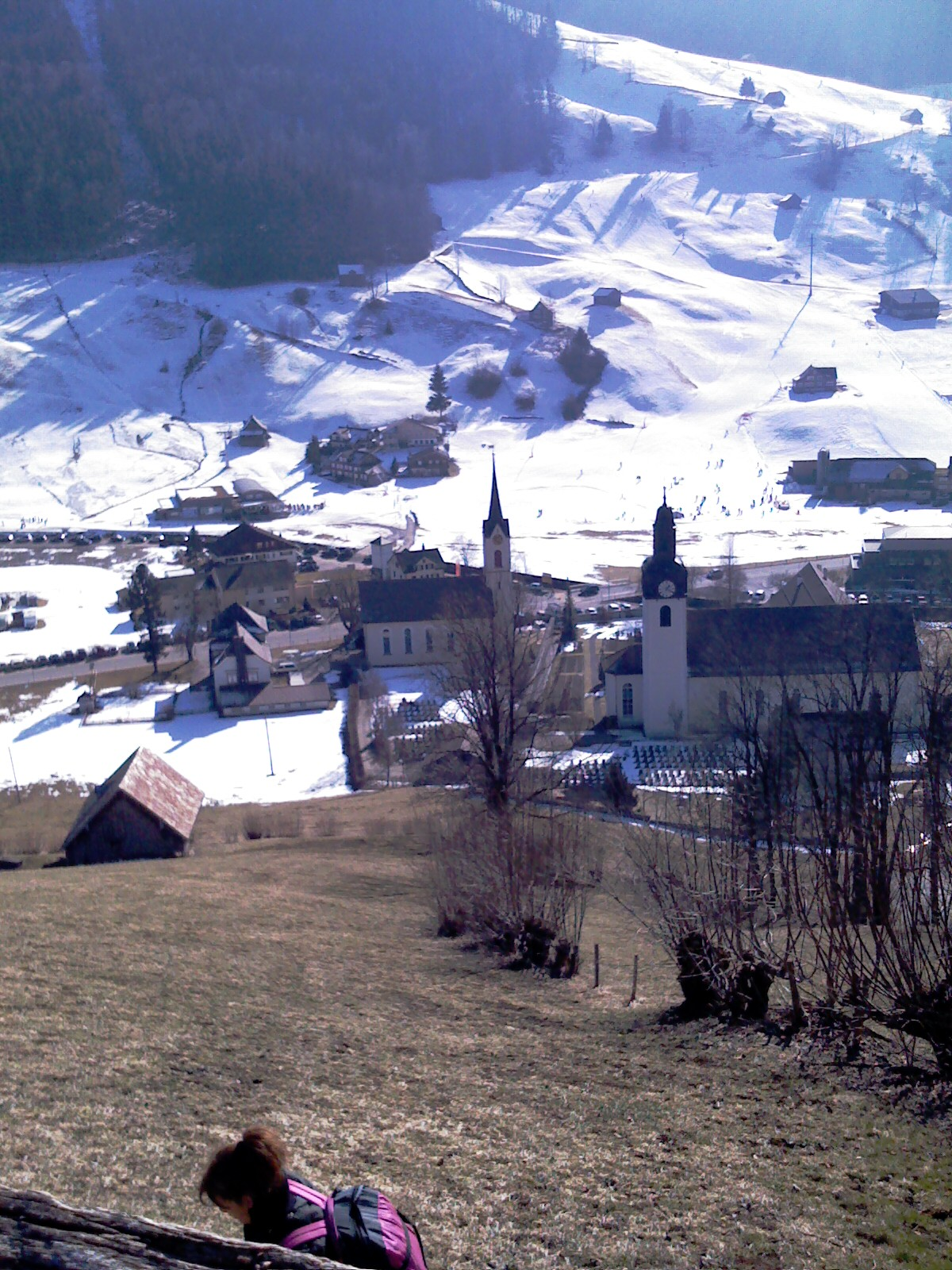 Churches of Alt St. Johann, Toggenburg, Switzerland - Pregxejoj de Malnov-Sankt-Johano, Togenburgo, Svislando